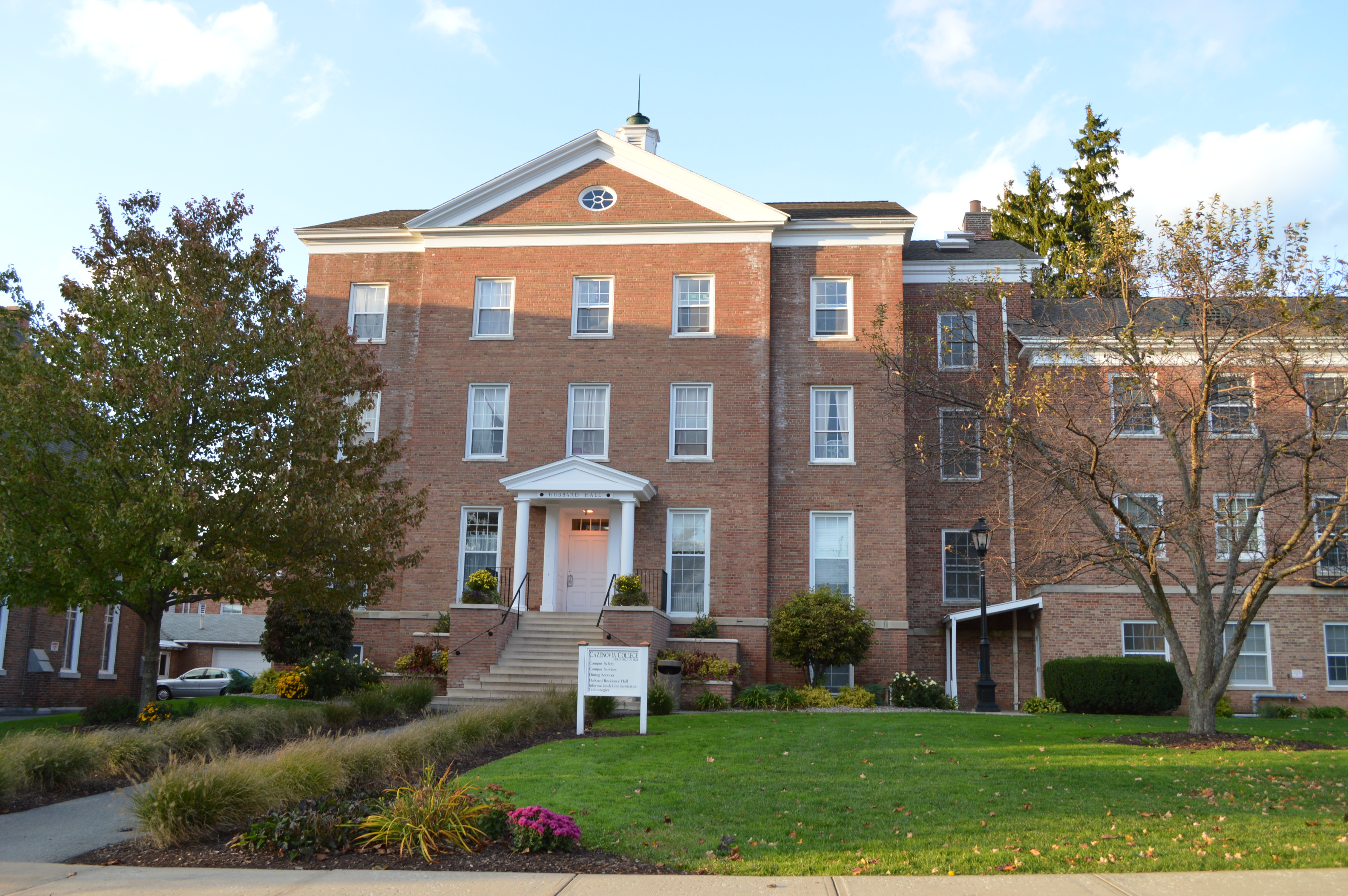 Hubbard Hall